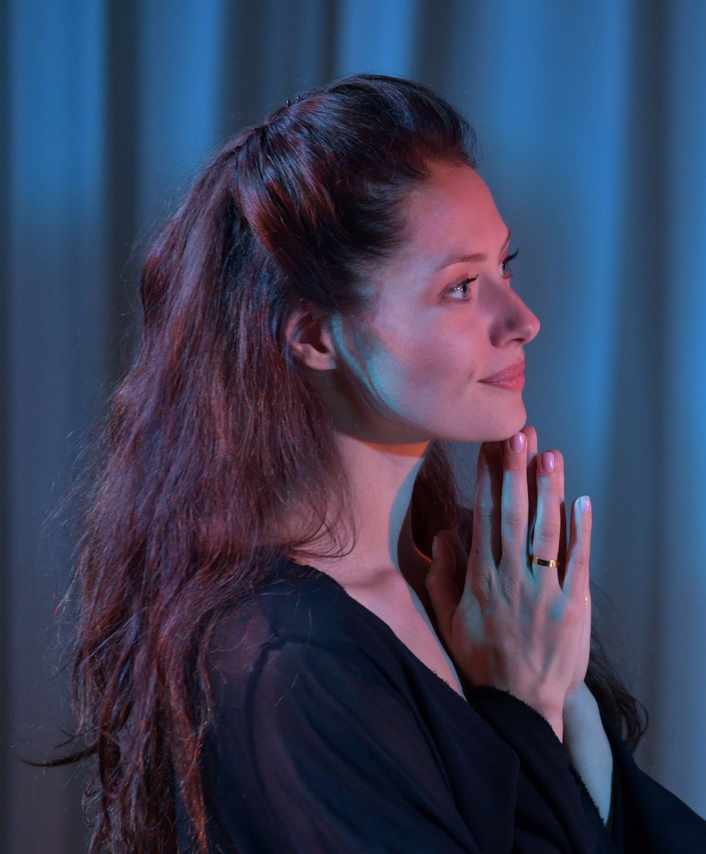 Ingrid Margus